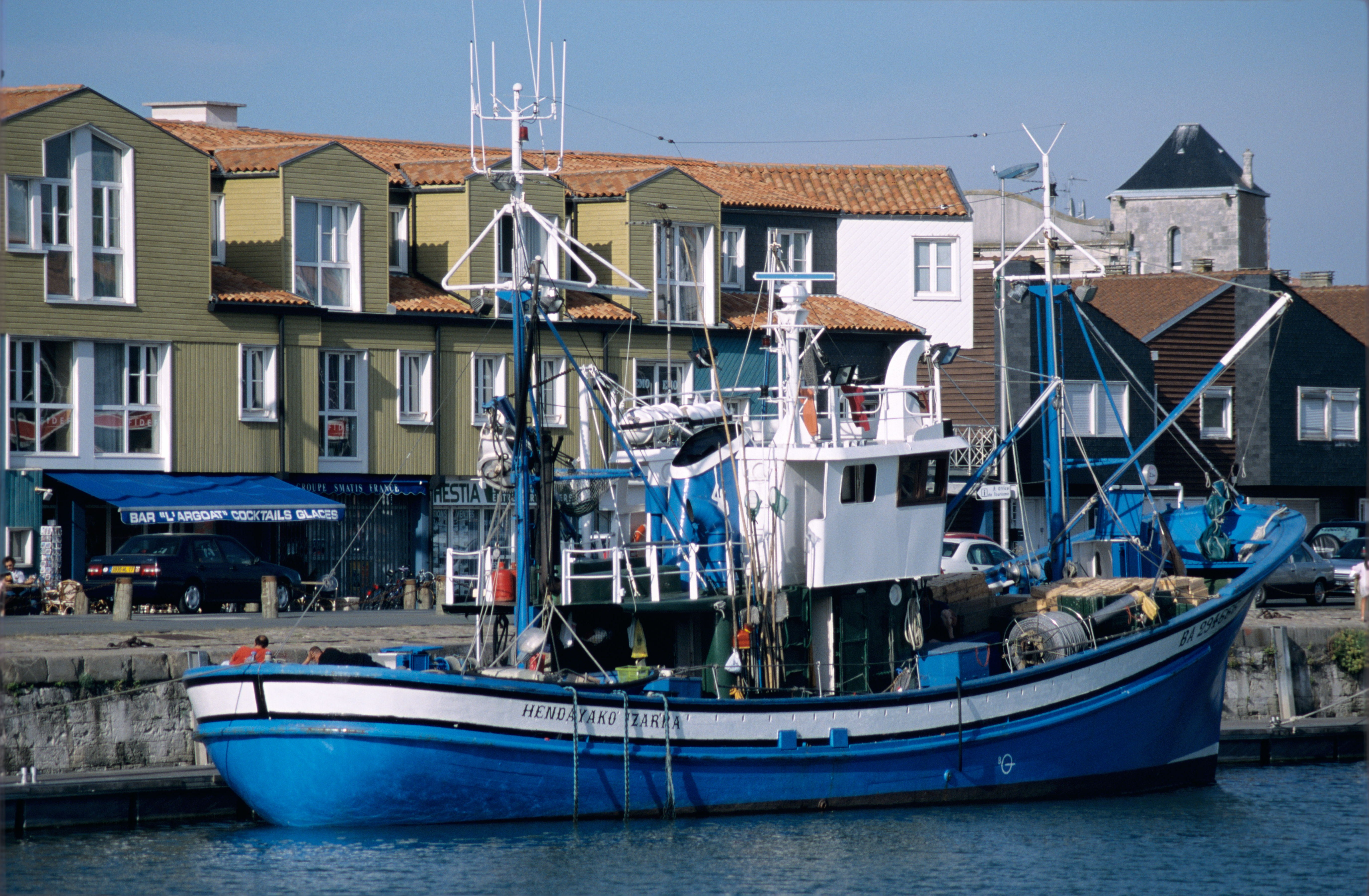 Un bolincheur est un bateau de pêche qui capture le poisson à l'aide d'une bolinche, c'est-à-dire un filet presque rectangulaire muni de flotteurs dans sa partie supérieure et qui est disposé en arc de cercle dans l'eau pour piéger le poisson. Une bolinche sert à pêcher la sardine, l'enchoi, le thon. Ce type de filet est aussi appelé "seine" (qui s'écrit aussi "senne"). Une bolinche est plus précisément une seine de petite dimension pour la pêche côtière. A la différence du chalut, la bolinche n'écrase pas le poisson. Le présent bolincheur basque "Hendayako Izarra" est aussi un canneur. Le thon est attrapé à l'aide de cannes (à la ligne). Ce bolincheur canneur est typique des bateaux de pêche du pays basque. Il présente la forme traditionnelle d'une forte tonture (courbure du pont). L' "Hendayako Izarra" a été mis en service en 1964. Sa coque est en bois et il mesure 24,90 mètres. Il a été désarmé en 2005. Cette photographie représente l' "Hendayako Izarra" en escale au port de La Rochelle (Charente Maritime, France).